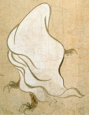 cloth-like monster (布の妖怪) from Hyakki Yakō Emaki (百鬼夜行絵巻)